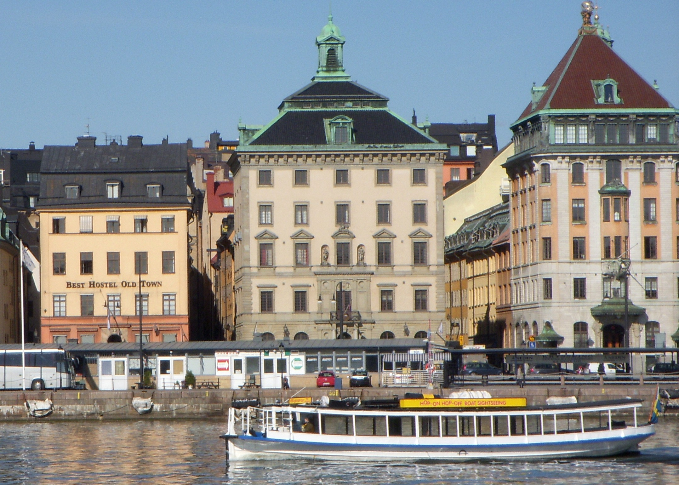 Fr. v. Skeppsbron 22, 20, 18, (i mitten ligger kv Bacchus)